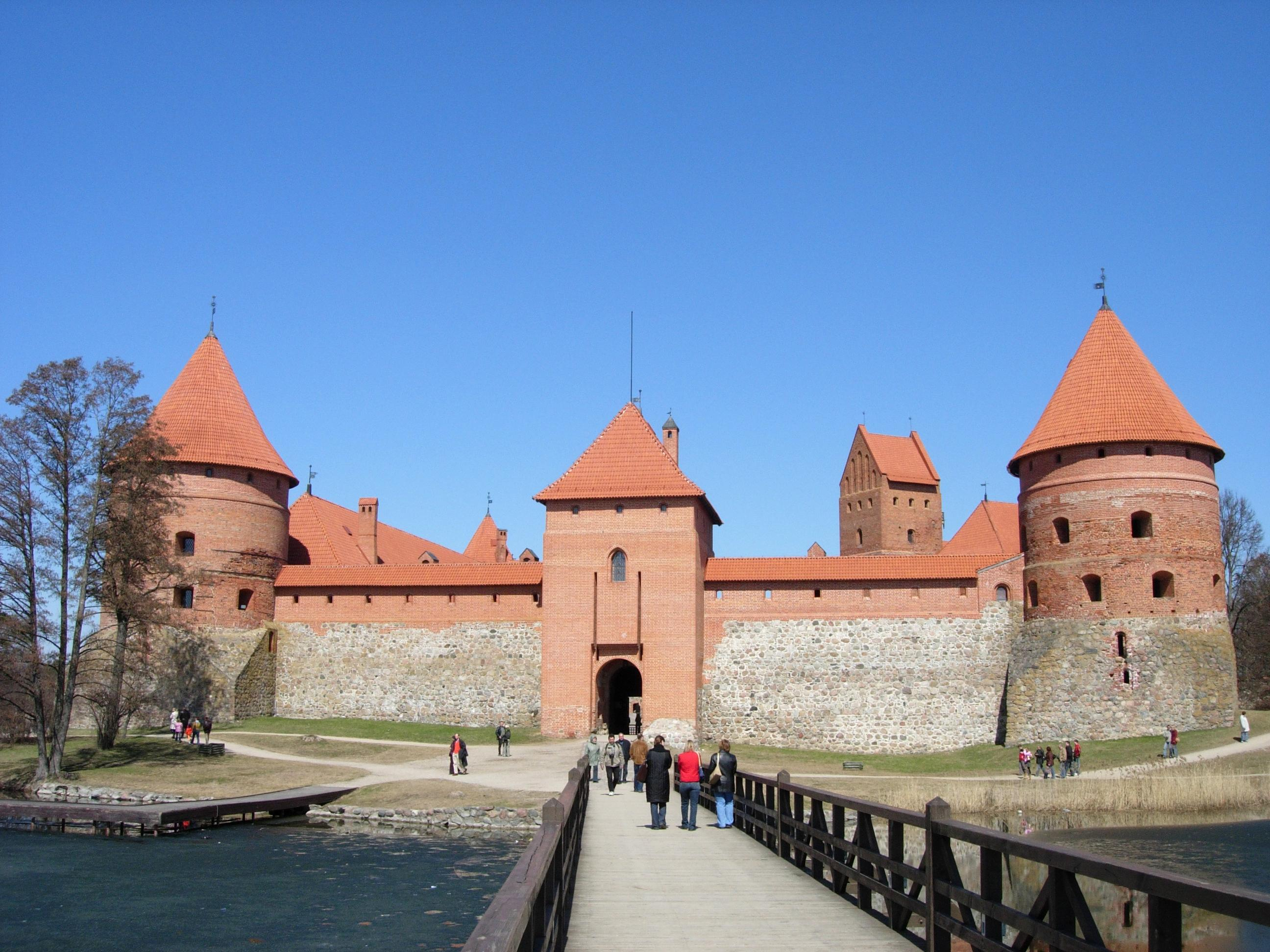 En klar aprildag vid slottet Trakai, Litauen.